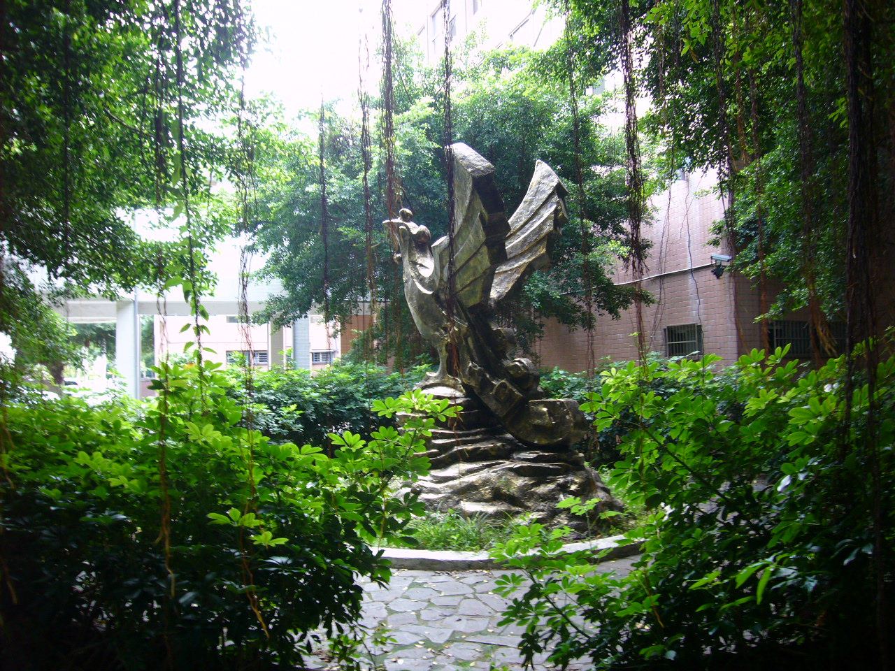 臺北市立大同高級中學鳳池